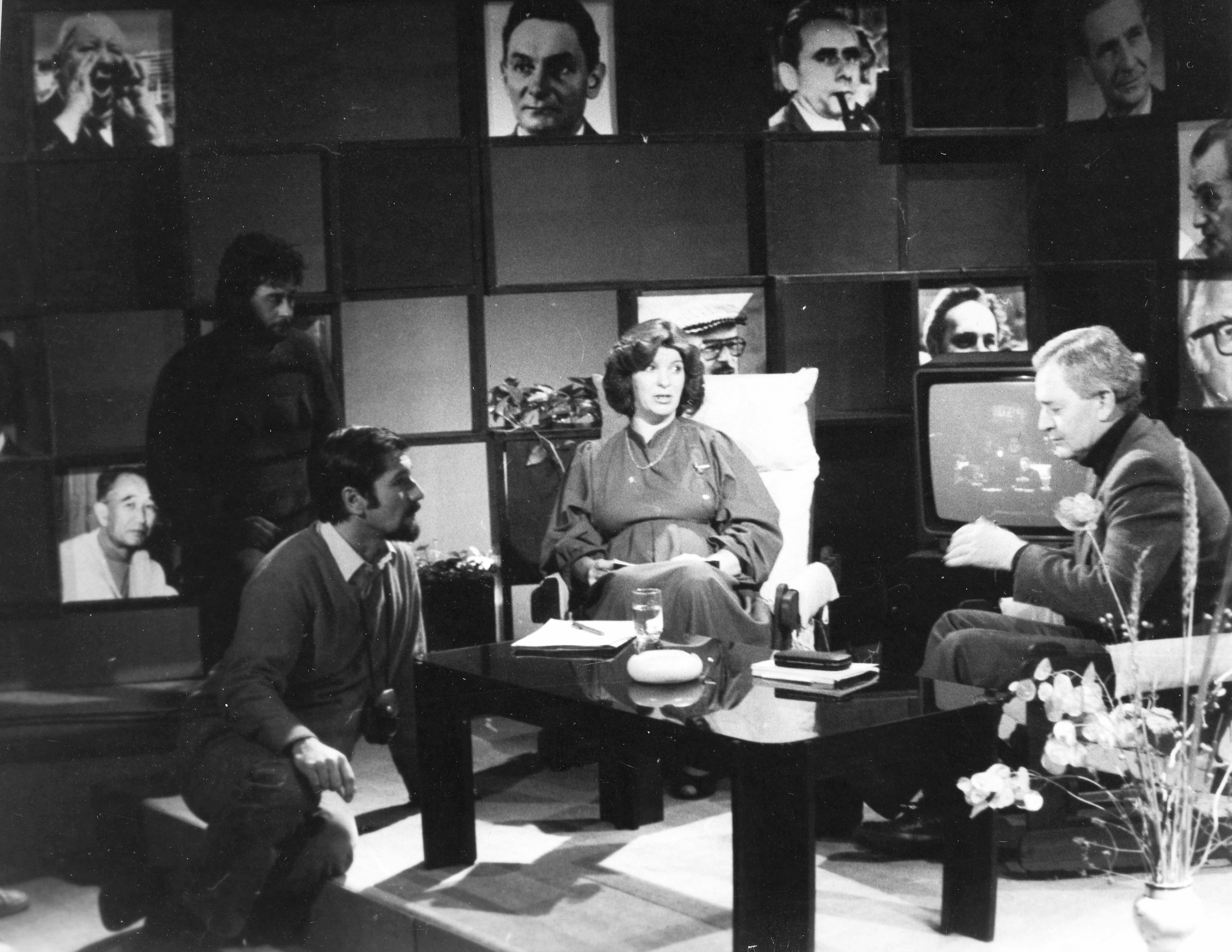 az MTV Mozaik című műsora, Ránki Júlia riporter és Szabó István filmrendező. Location: Hungary, Budapest V. Tags: Hungarian TV, Budapest Title: az MTV Mozaik című műsora, Ránki Júlia riporter és Szabó István filmrendező.